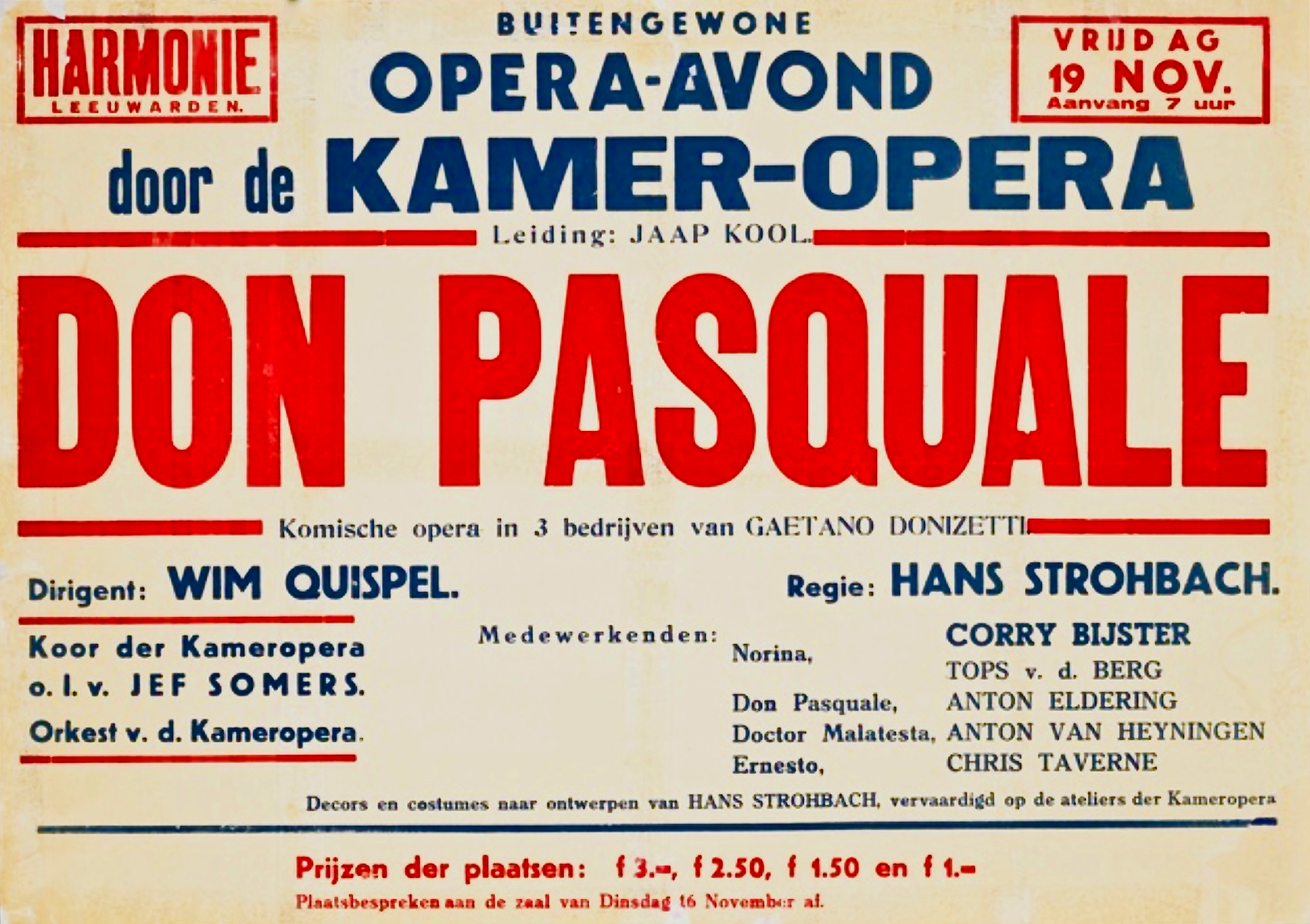 De Kameropera unter Leitung von Jaap Kool (1891–1959): Don Pasquale, Komische Oper in drei Aufzügen von Gaetano Donizetti, Regie: Hans Strohbach (1891–1949), Dirigent: Wim Quispel